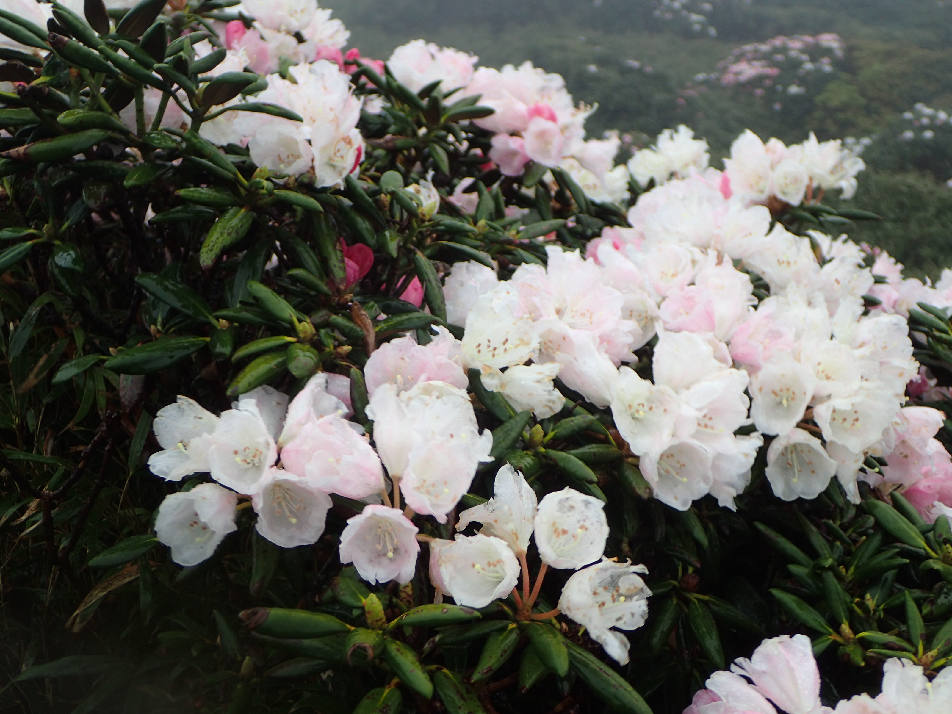 焼野のヤクシマシャクナゲ。満開。5月下旬。